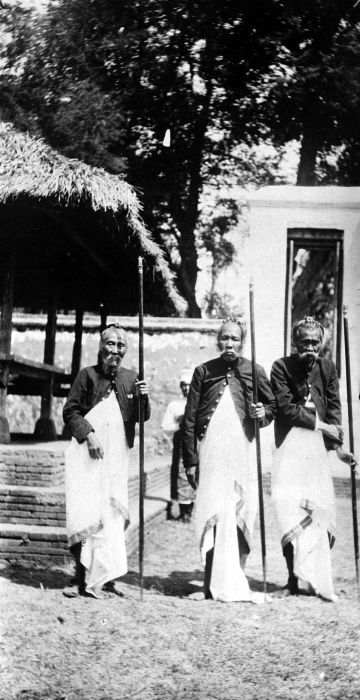 Repronegatief. De drie pedanda's (priesters) van Singaraja, Bali.